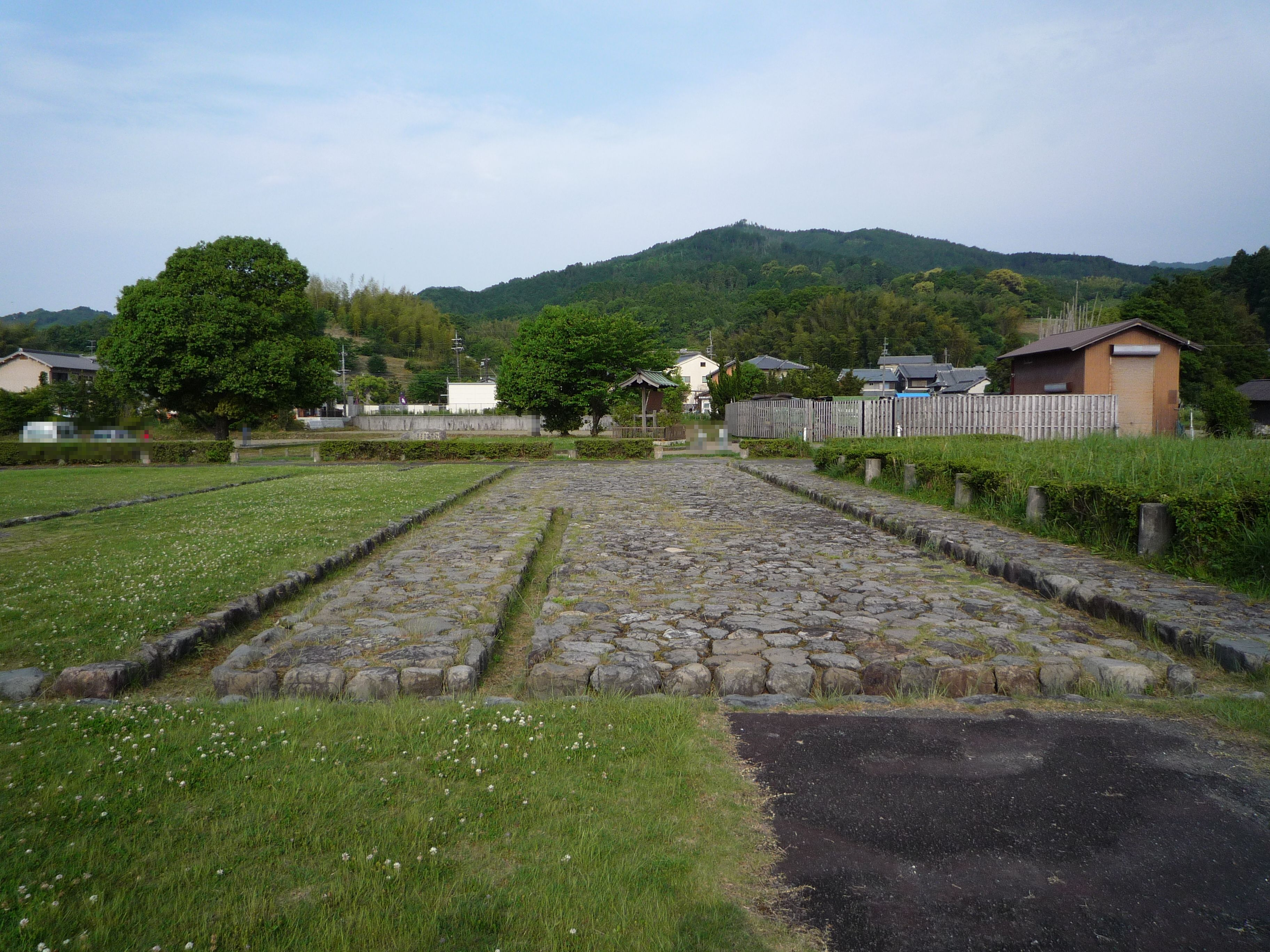 奈良県明日香村 板蓋宮